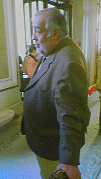 Philippe Séguin en 2005.